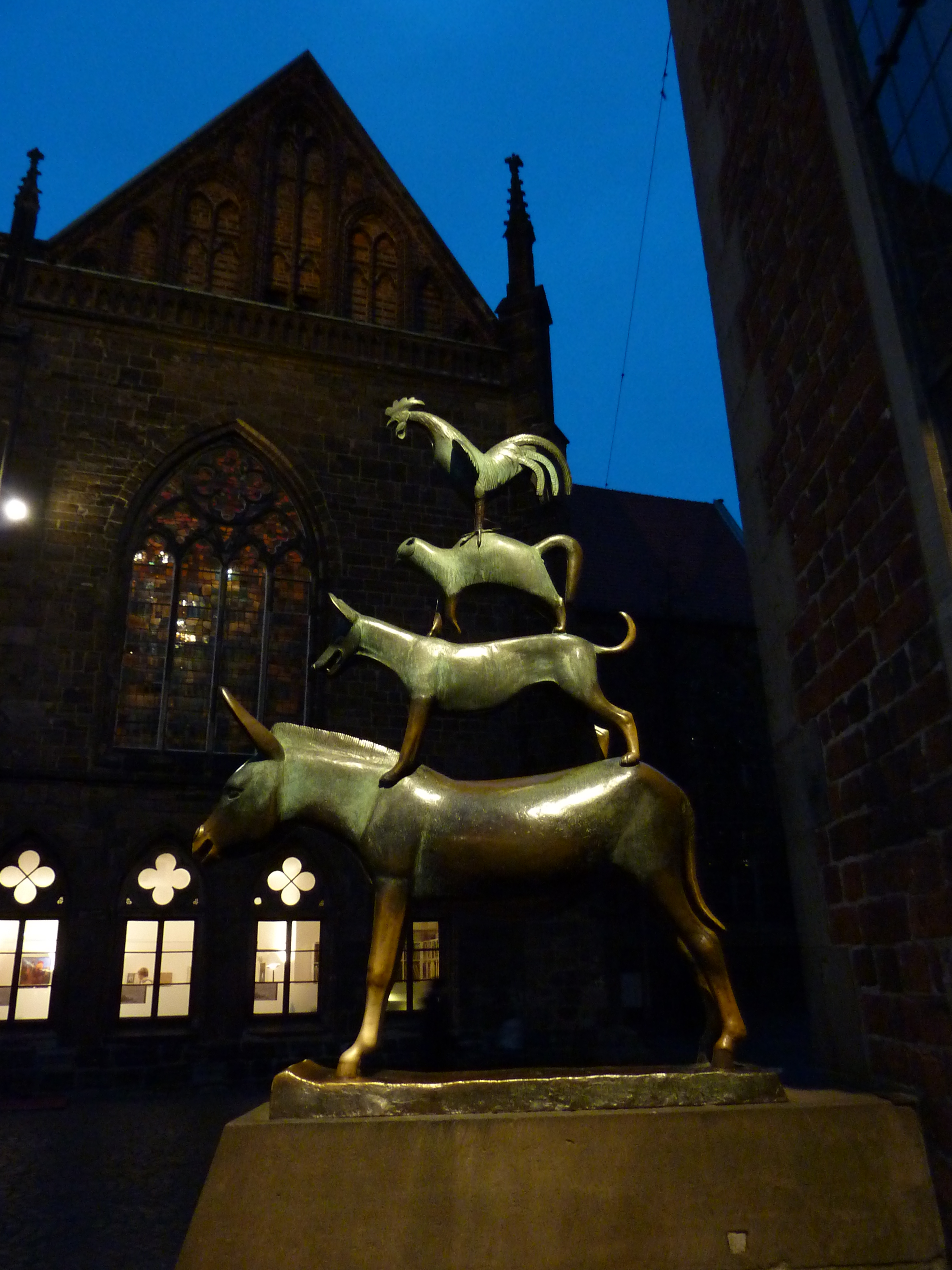 Бременские музыканты